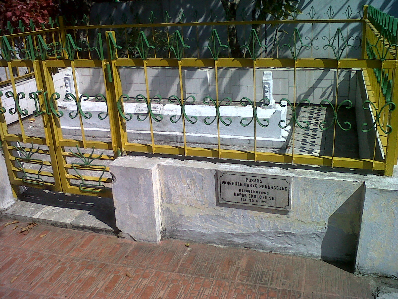 Makam Arya Penangsang